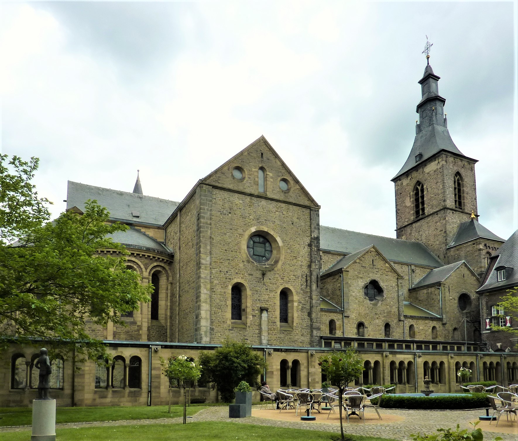 Rolduc